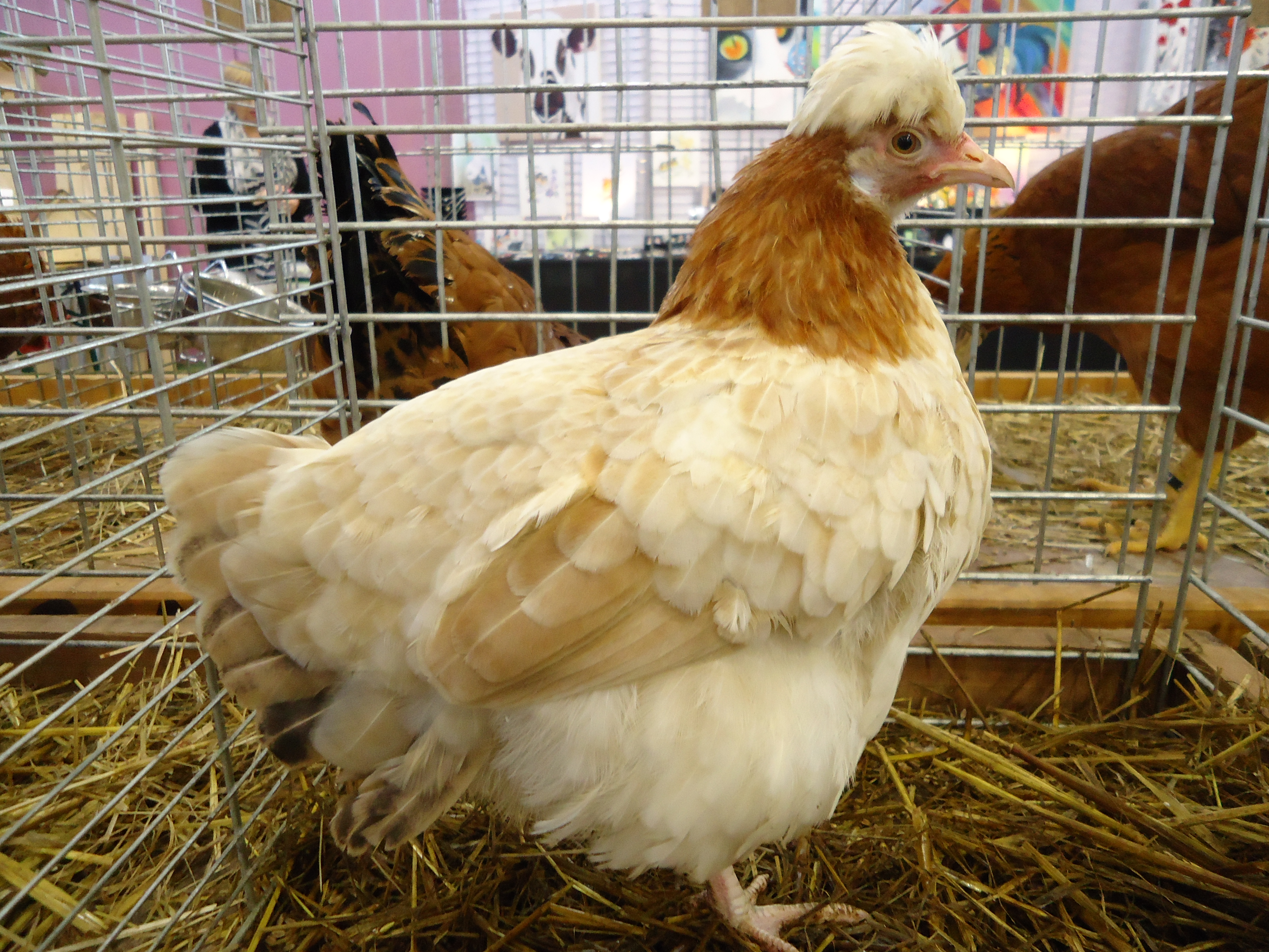 Poule